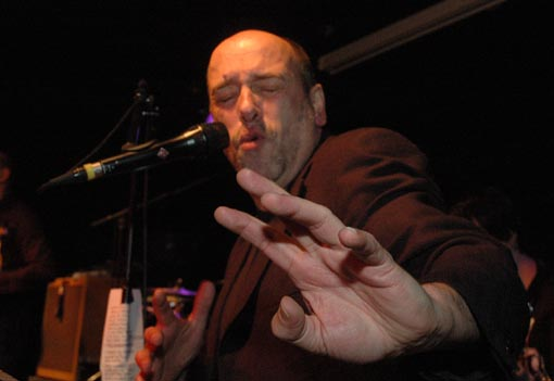 Jürgen Waidele mit seiner "Conversation" bei einem Auftritt in Freiburg